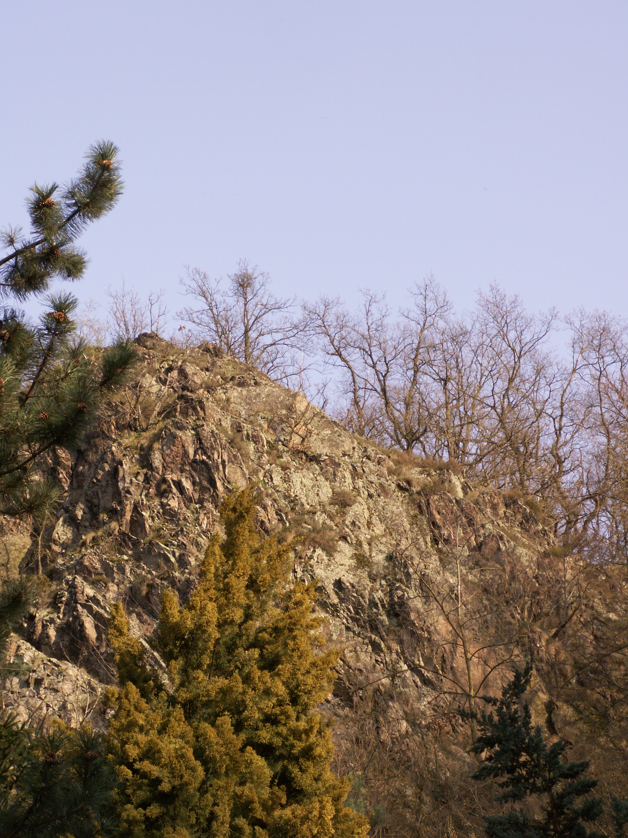 Červené stráně, přírodní památka ev. č. 5706 poblíž obce Nové Bránice v okrese Brno-venkov